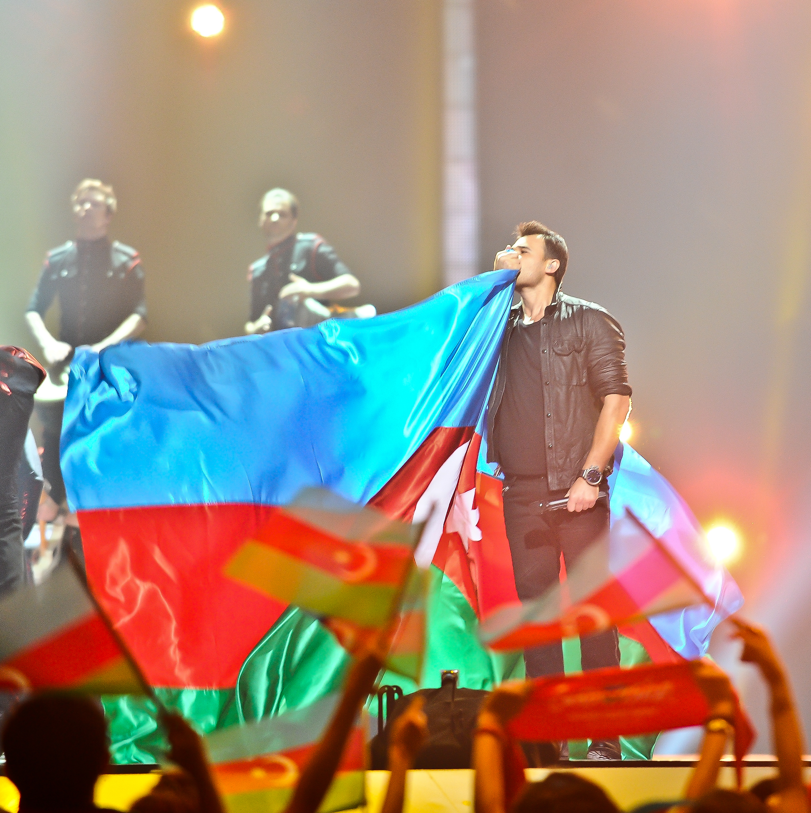 Эмин Агаларов